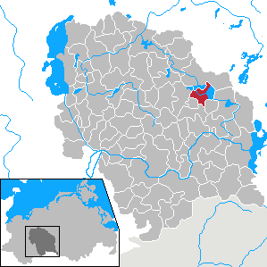 Goldberg in Mecklenburg-Vorpommern - District Parchim